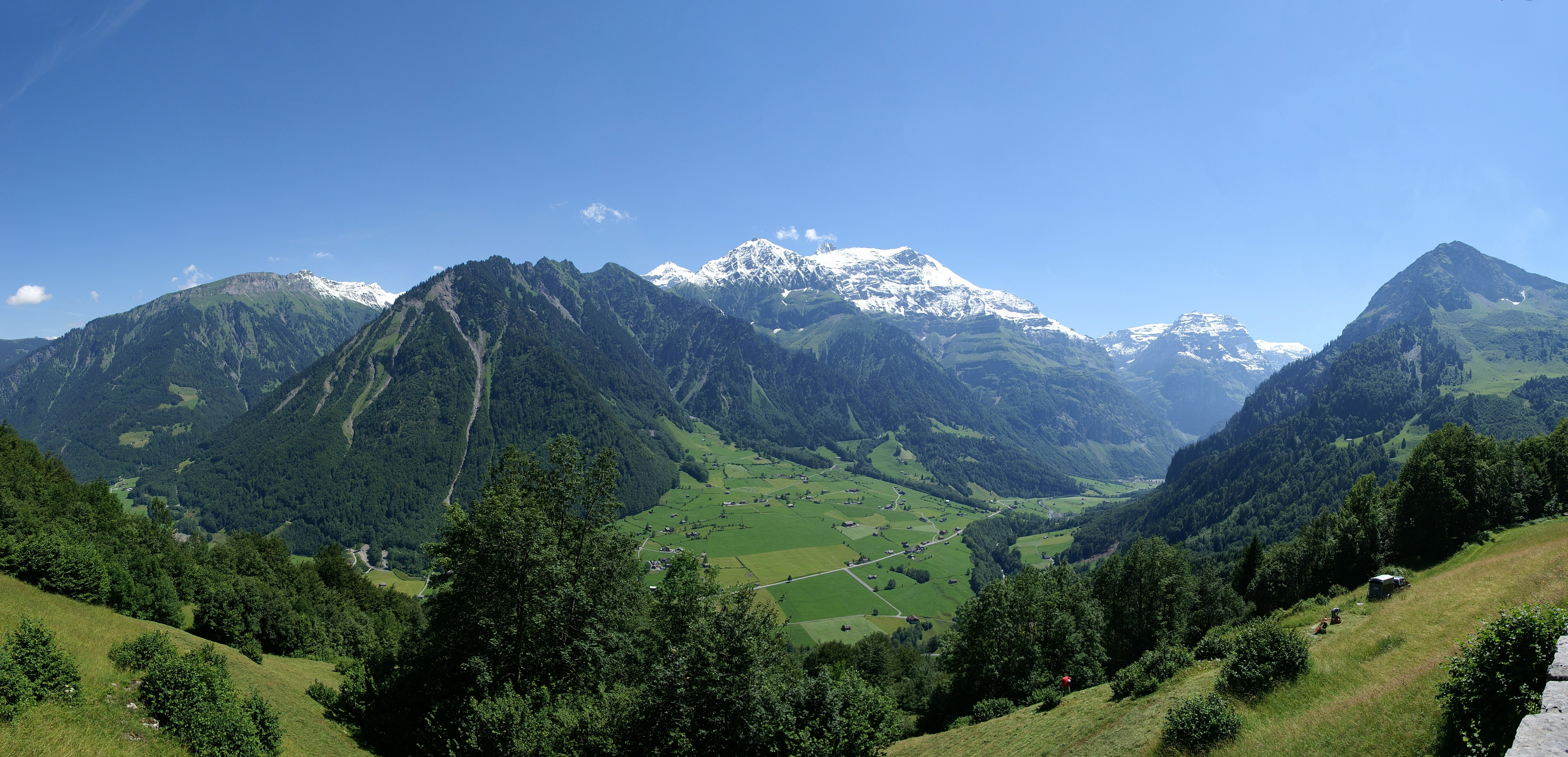 Blick von der Klausenpaßstraße (Fruttberg) auf die Berge der Glarner Alpen: v.l.n.r. der Vorstegstock 2'678m, das Scheidstöckli 2'810m, Vorder-(2'750m) und Hinter-Selbsanft(3'029m), der Bifertenstock 3'425m, der Bifertenfirn. Rechts grün bewaldet steigt der Chamerstock (2'123m) an. Im Tal der Weiler Auengüeter von Linthal.